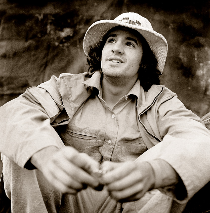 MC Rene beim splash! 2000